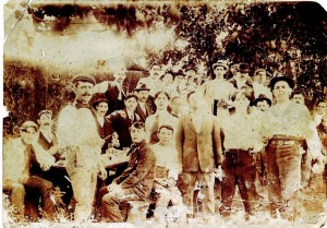 Es la foto de los fundadores de Unión